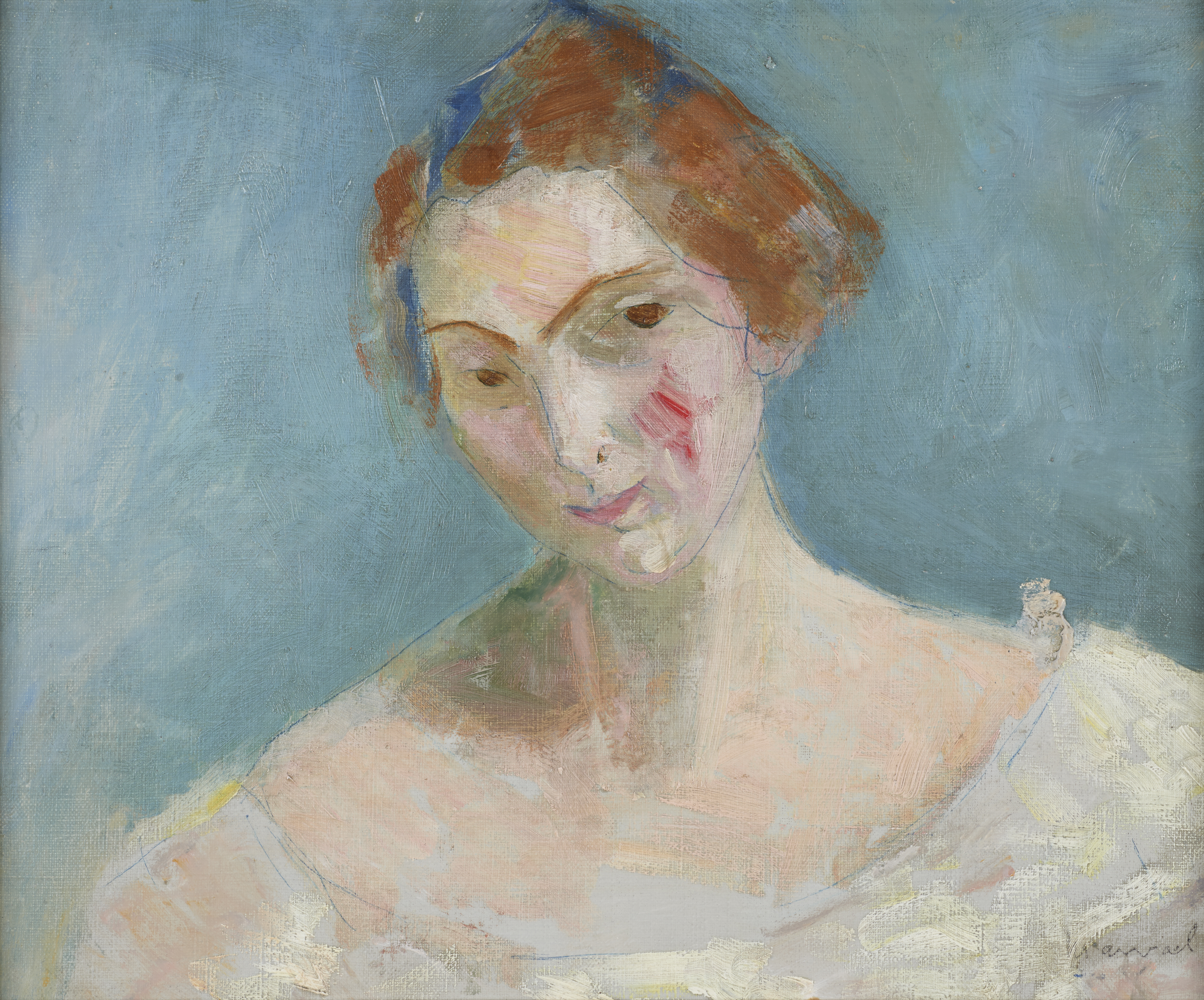 Œuvre de la collection de Lucien Mainssieux